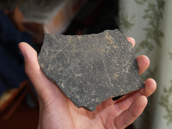 Орнамент на чернолощеной керамике новосвободненской культуры. Может быть самый ранний знак праиндоевропейской письменности?